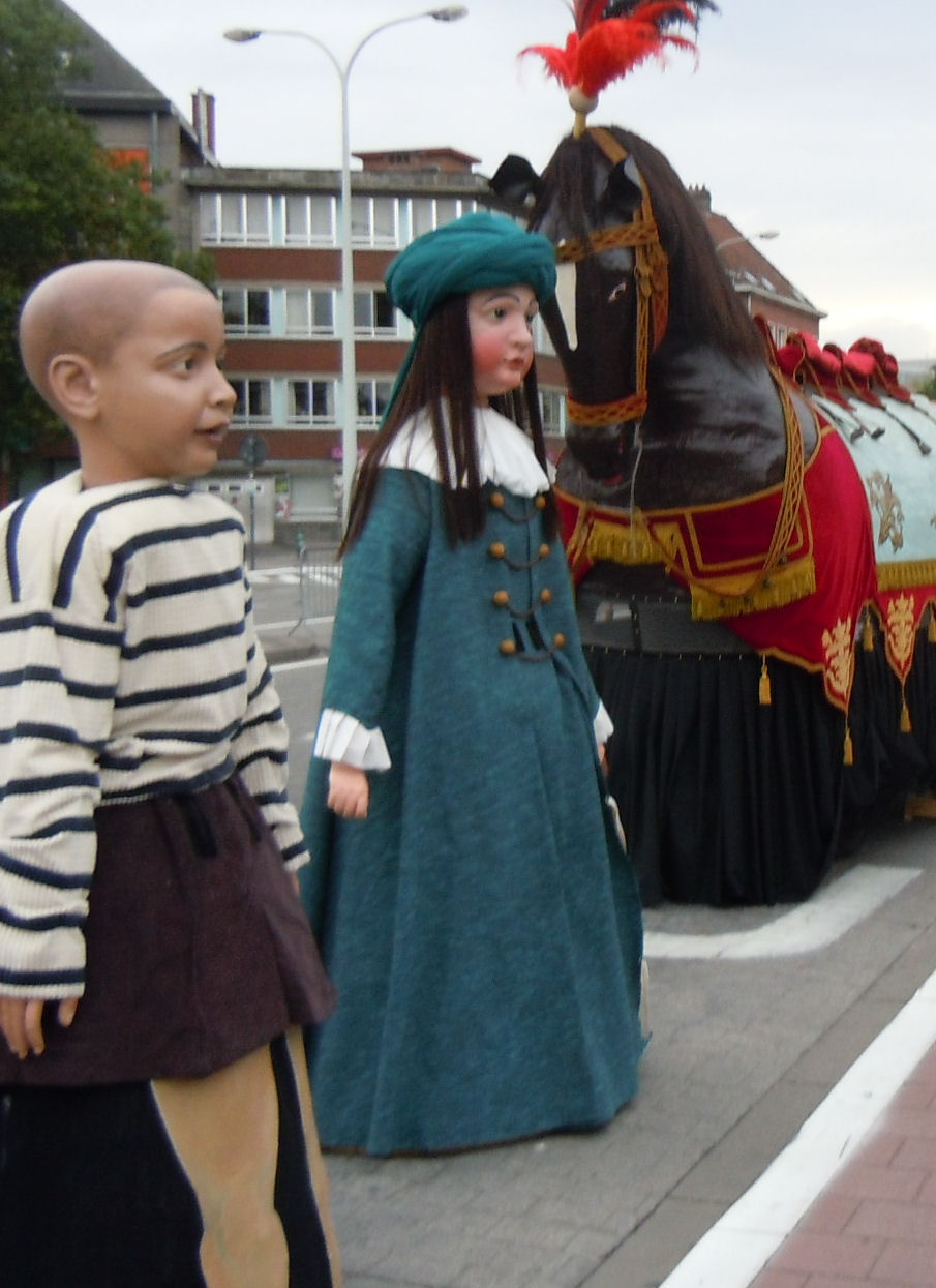 giants of Mechelen